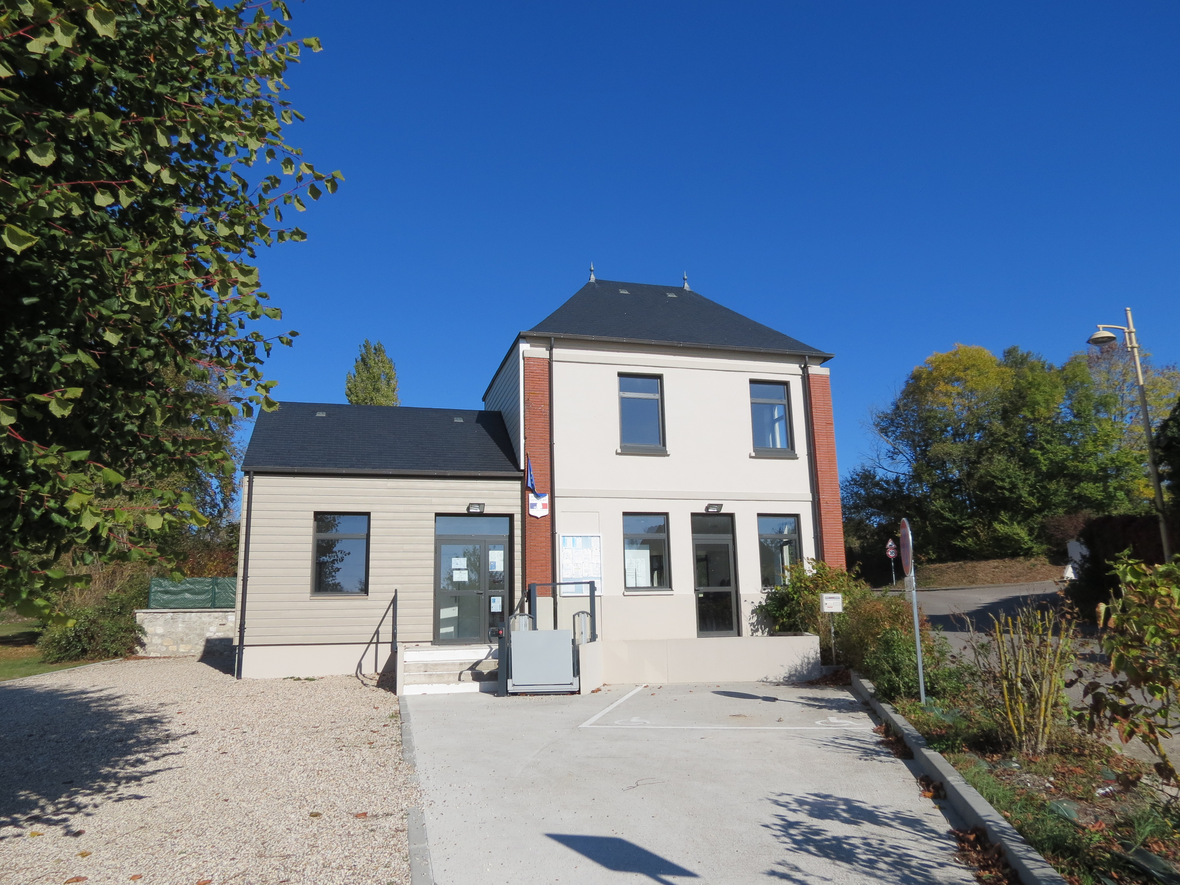 Mairie de Sancourt.